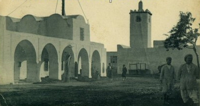 Place à Dar Chaâbane au début du XXème siècle